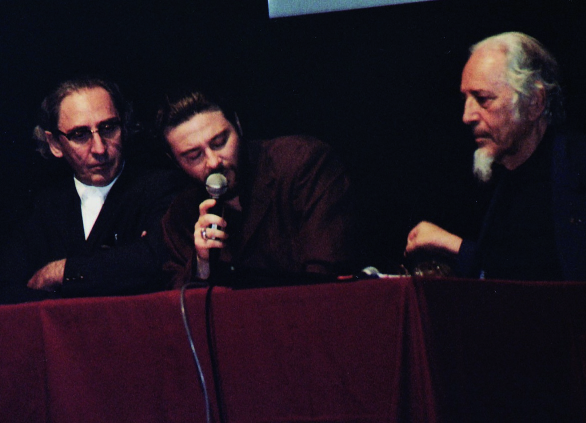 Franco Battiato, Gianluca Magi, Gabriele Mandel "Misticismo d'Oriente e d'Occidente"